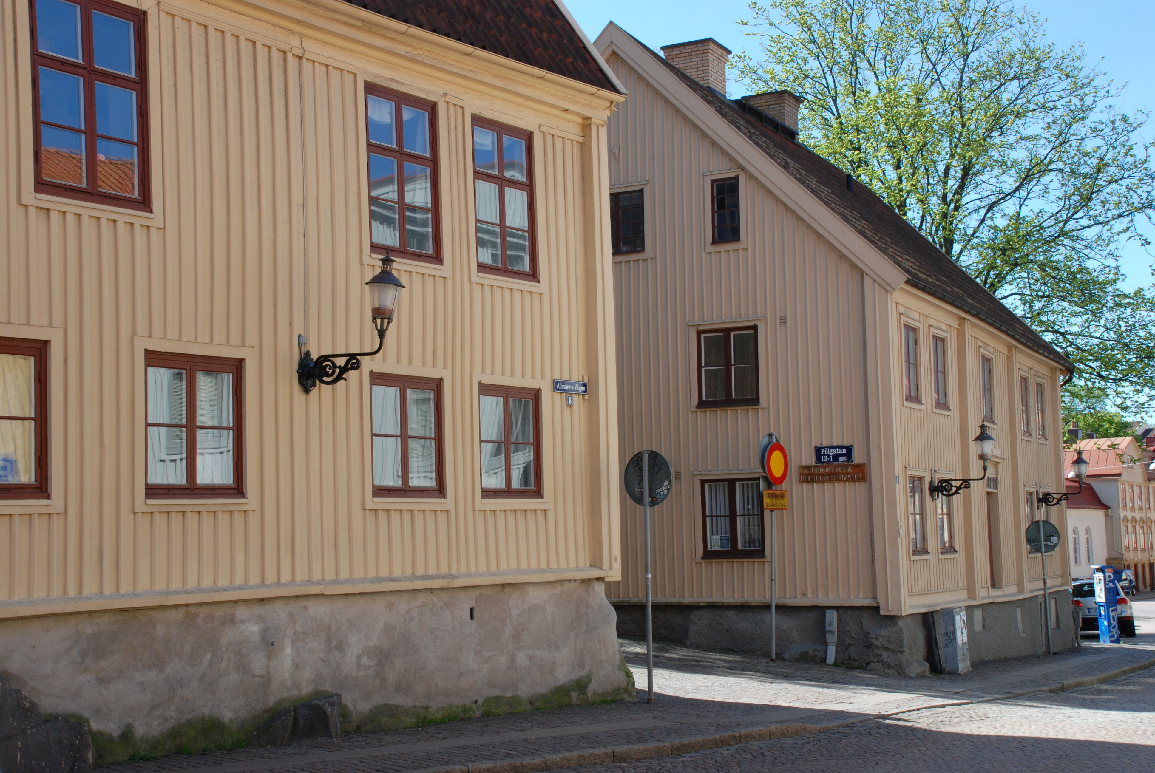 Allmänna Vägen vid Pölgatan/Gathenhielmska reservatet i Göteborg.